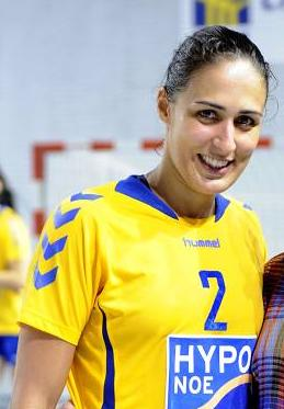 Fabiana Diniz, reprezentantka Brazílie v hádzanej žien